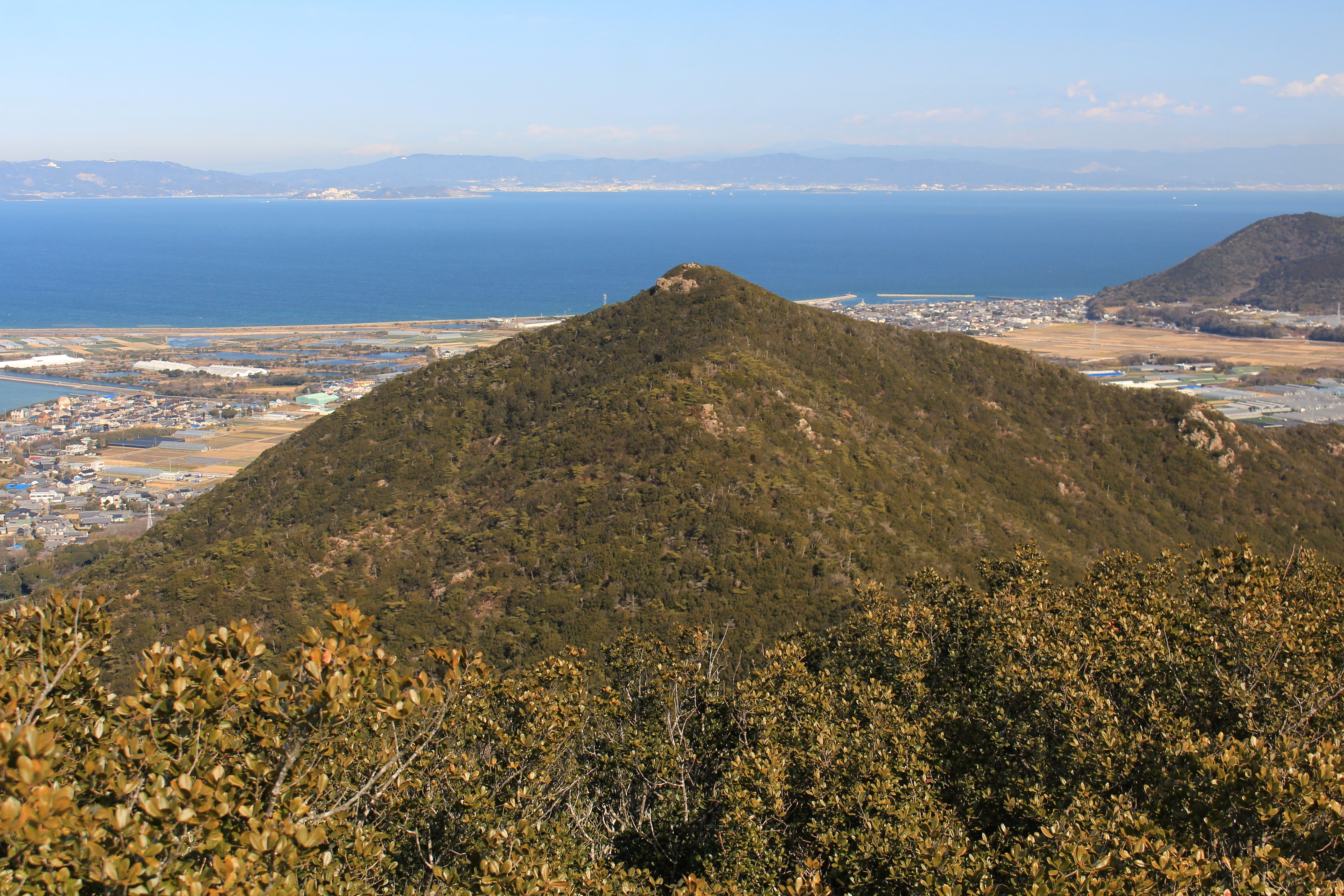 南側から望む雨乞山（愛知県田原市）、遠景は三河湾